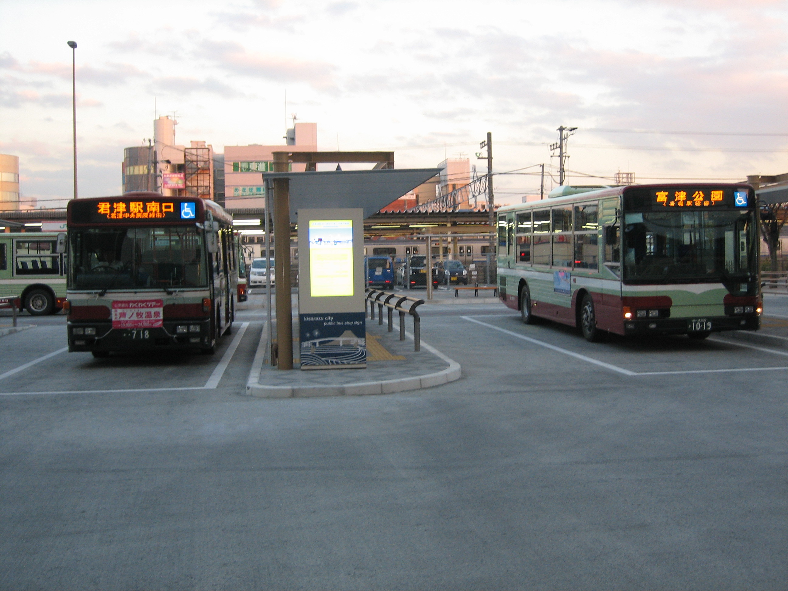 西口バスのりば